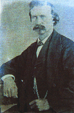 Fotografía de Georg von Lengerke (1821-1882)